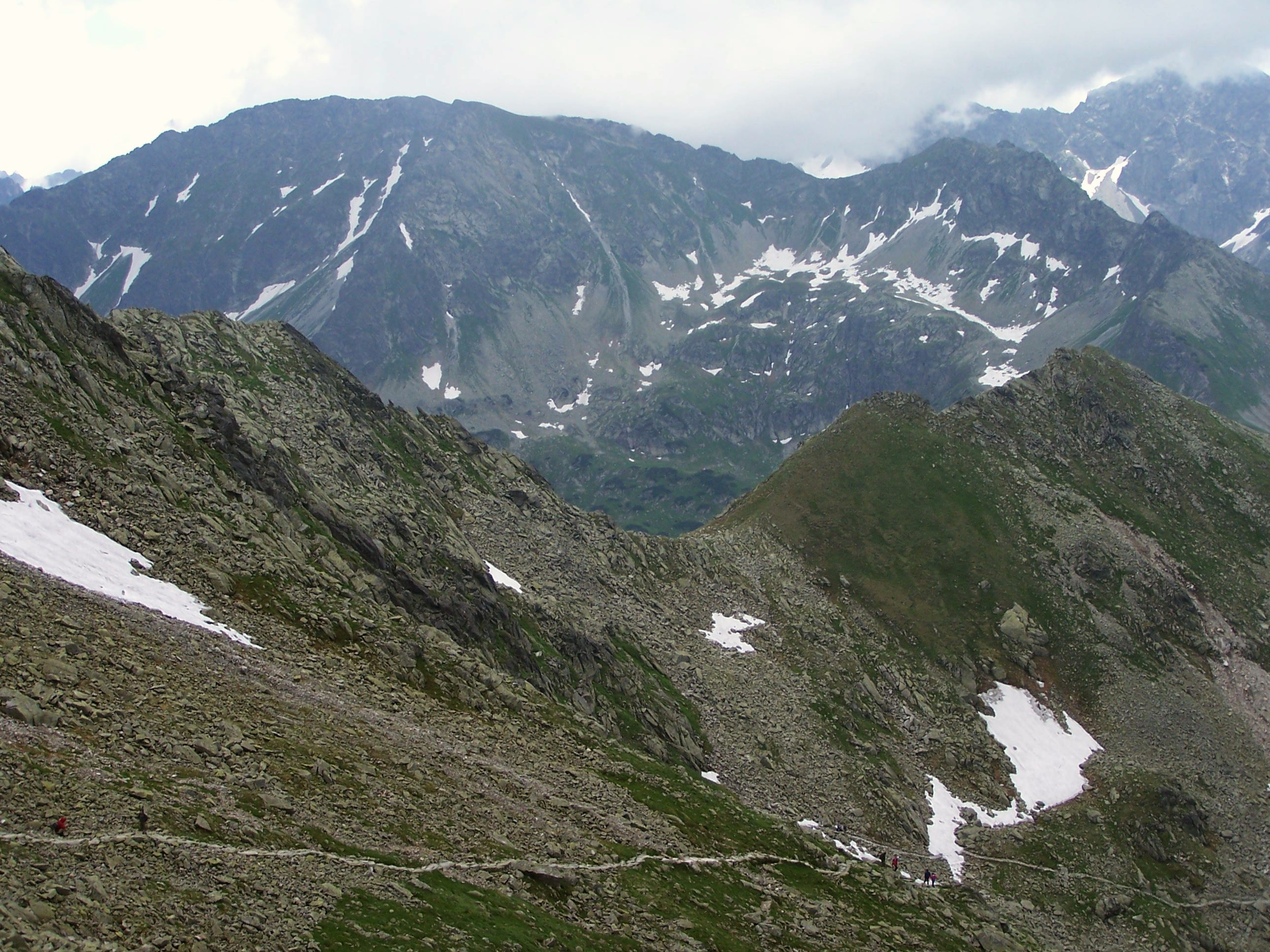 Przełęcz Schodki (High Tatra Mountains)